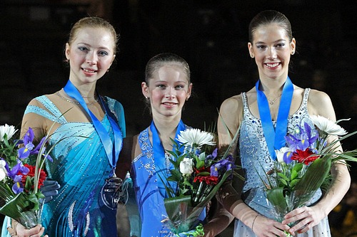 Подиум финала Гран-при среди юниоров по фигурному катанию сезона 2011-2012 в женском одиночном катании. Слева на право: Полина Шелепень (2-е место), Юлия Липницкая (1-е место), Полина Коробейникова (3-е место)